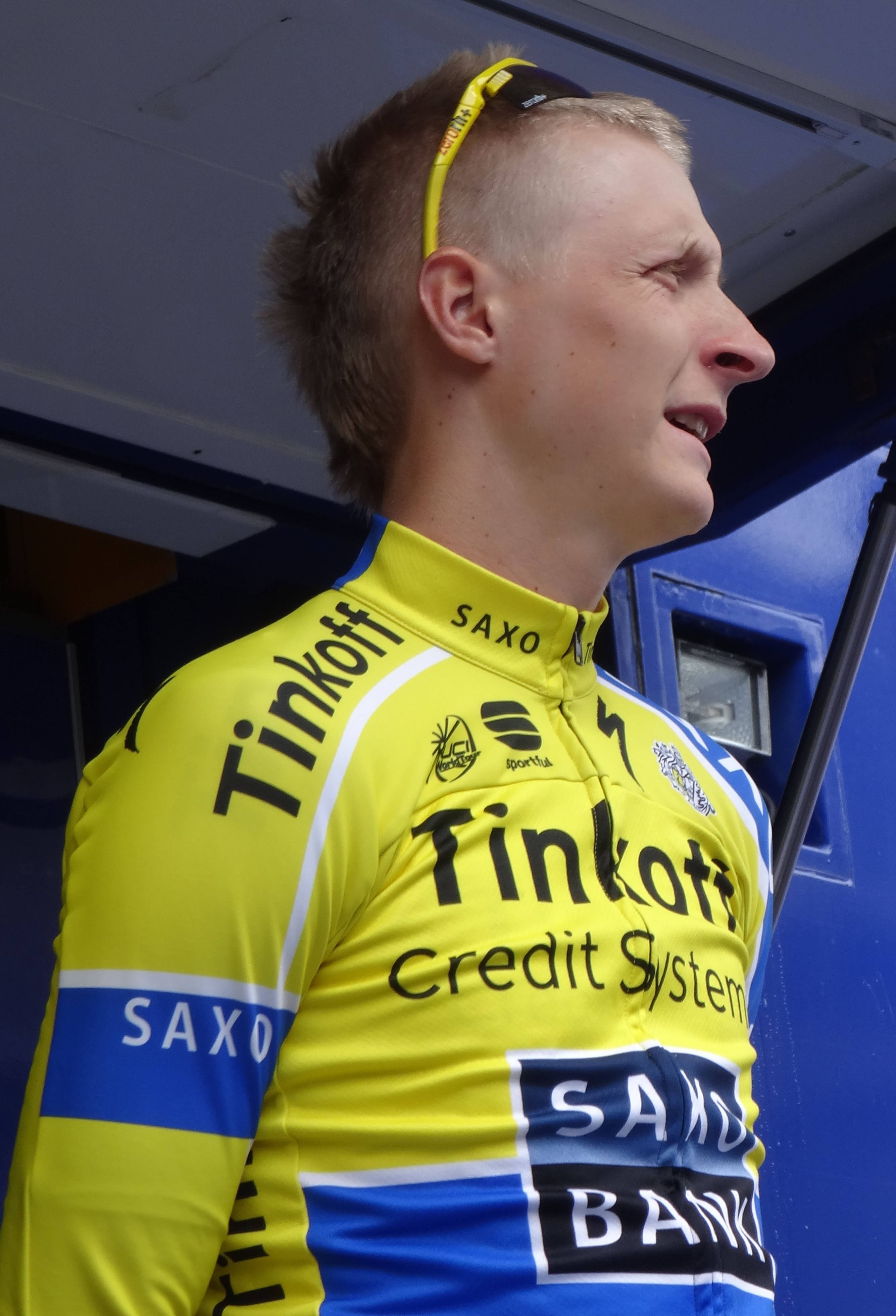 Reportage photographique réalisé le mercredi 7 mai 2014 au départ de la première étape de l'édition 2014 des Quatre jours de Dunkerque à Dunkerque, Nord, Nord-Pas-de-Calais, France. Depicted person: Marko Kump Depicted team: Tinkoff-Saxo